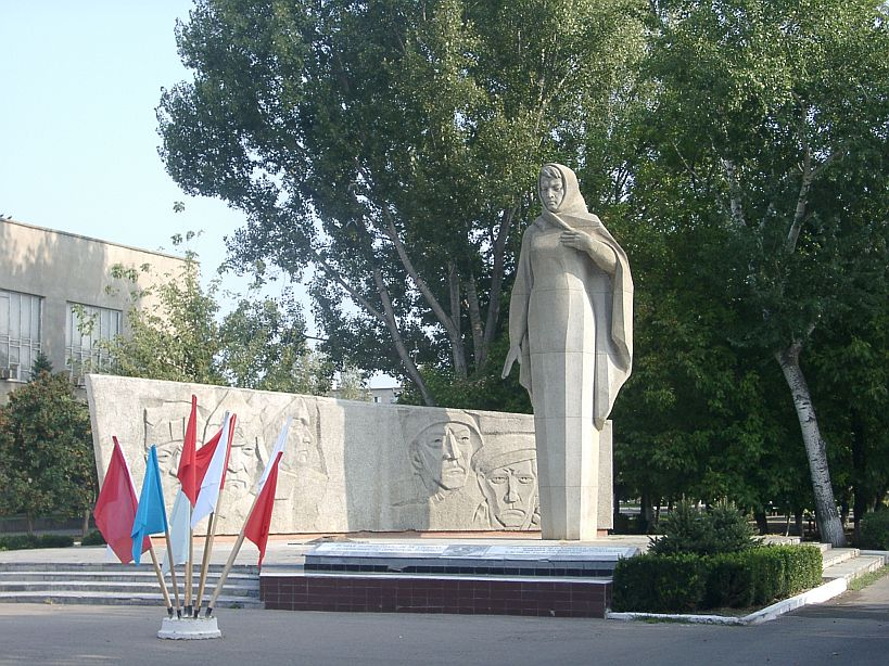 Монумент Родина-Мать и вечный огонь в Будённовске в память погибшим в Гражданской и Великой Отечественной войнах